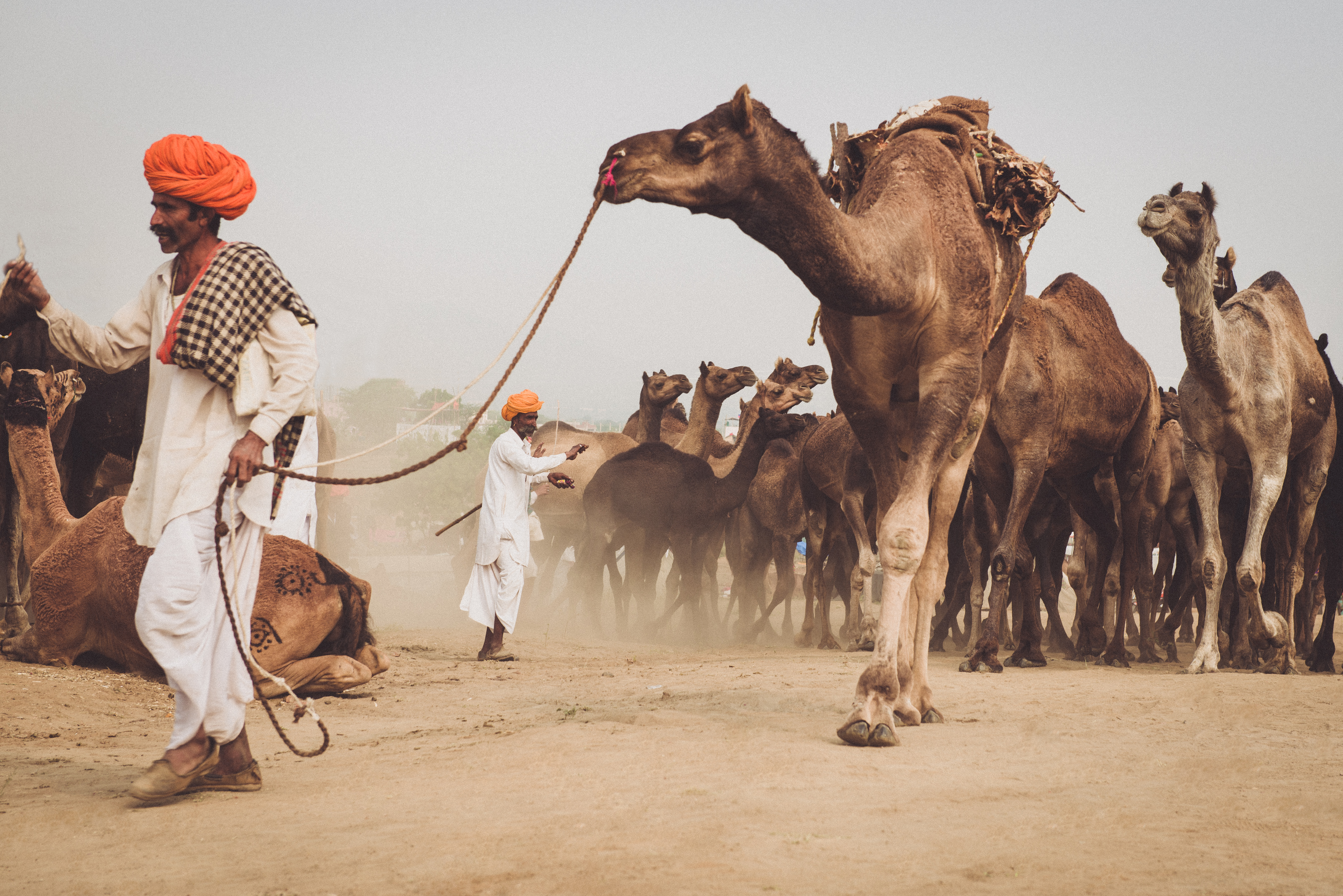 Pushkar, Rajasthan | India